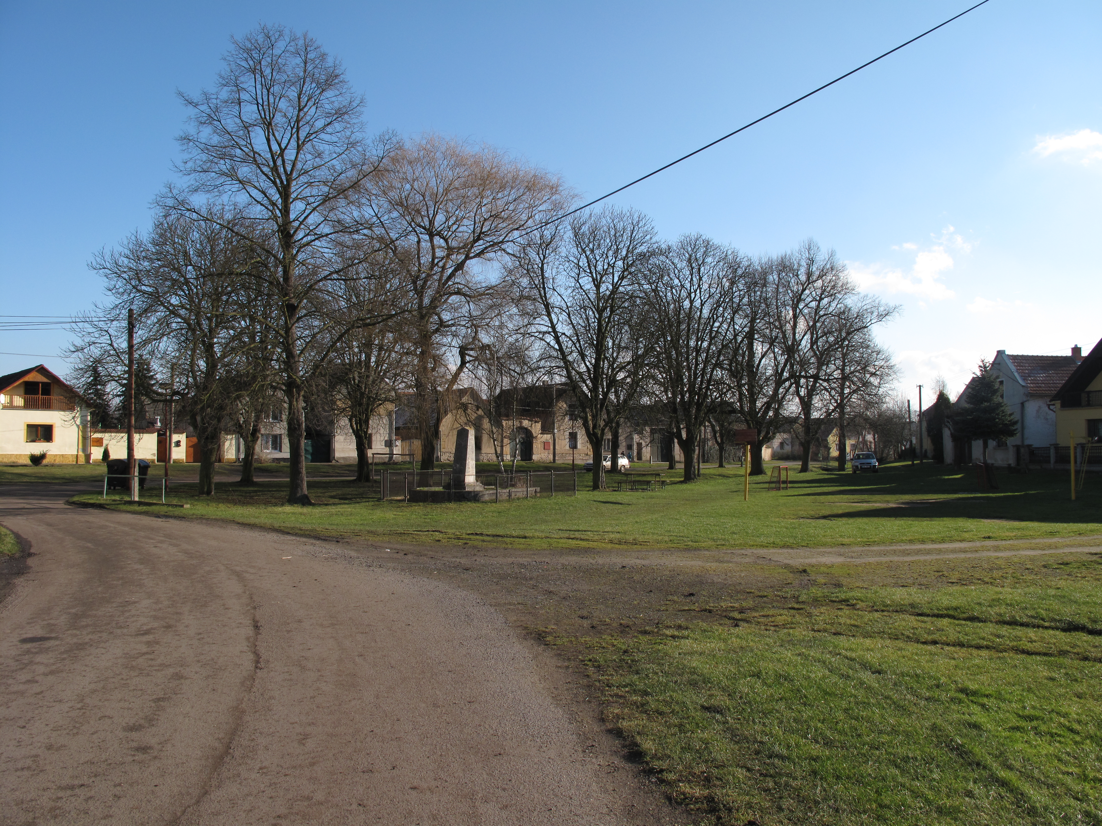 Náves v Pístech. Okres Litoměřice, Česká republika.